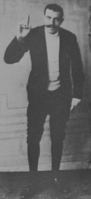 Le Petomane (pre-1914 photo)